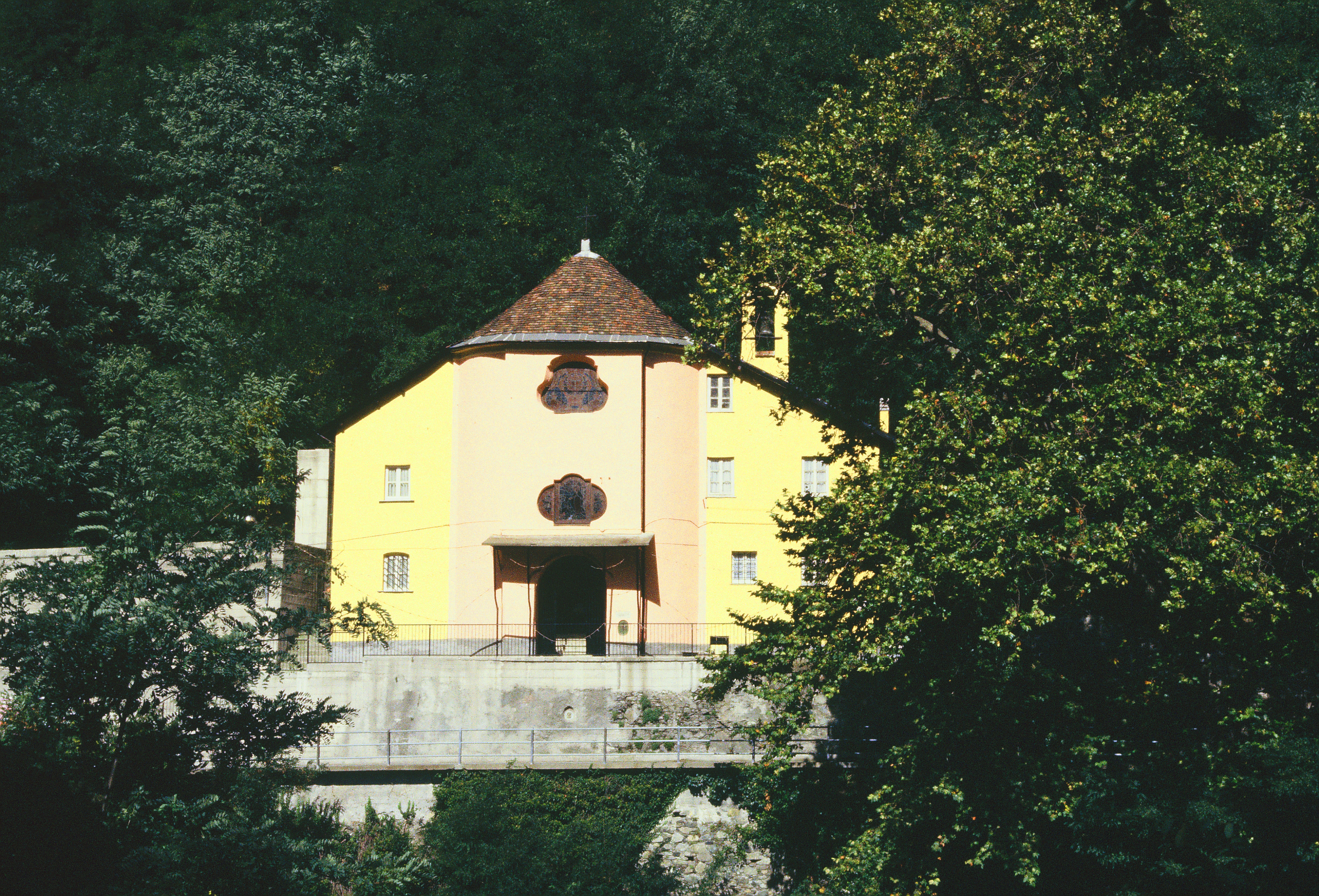 La Cappelletta dopo il restauro del 1983